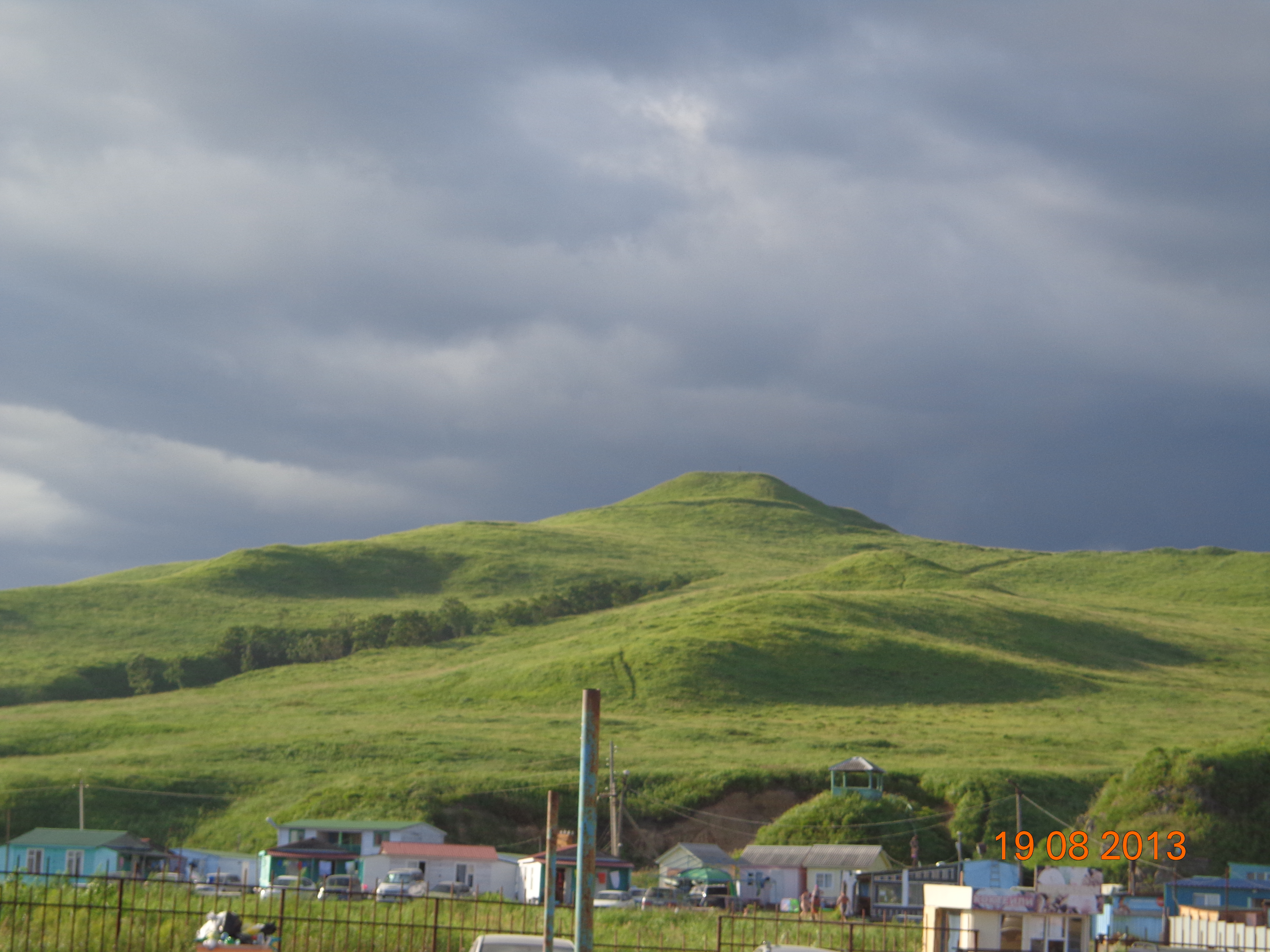 Возвышенность Сенькина Шапка, Октябрьский район This image is related to the protected area of Russia number 2510176